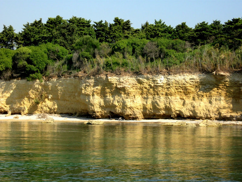 La spiaggia di Fontane Bianche (Sicilia)